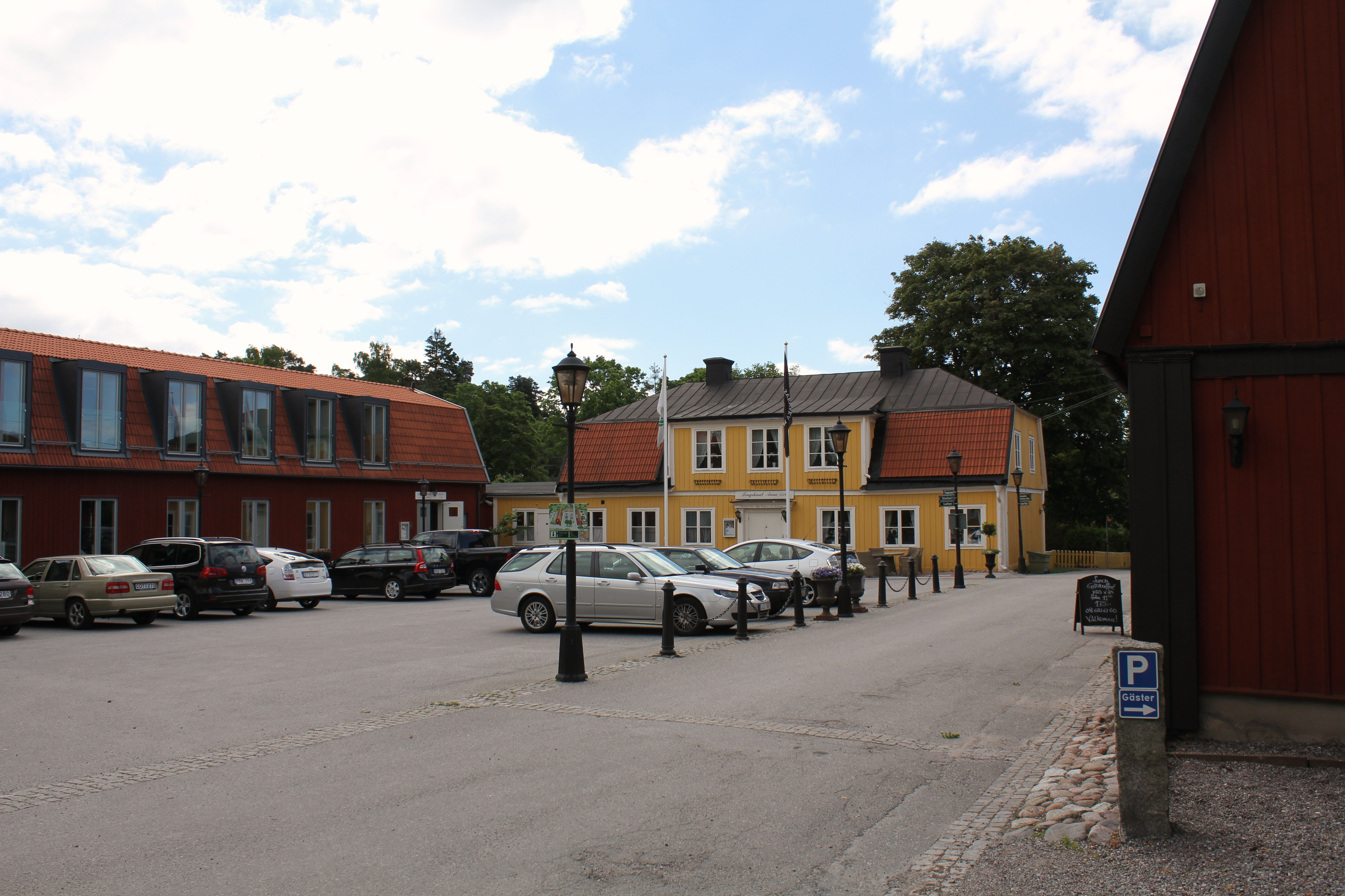 Barkarby gård. Det gula huset är Tingshuset, det röda närmast kameran Lasse-Majas krog.